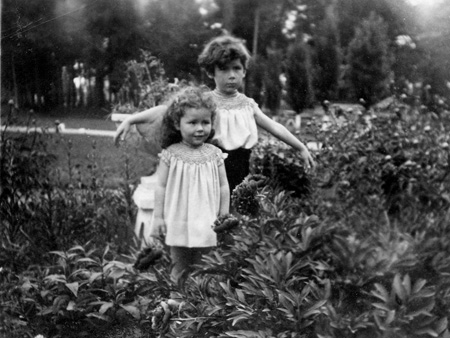 Portrait de Mimi Jutras et Claude Jutra, 1940